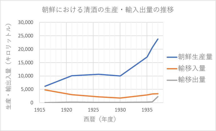 朝鮮に於ける酒造業の数値を基にExcelで新規作成